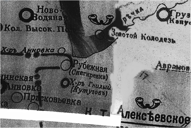 Фрагмент карти Бахмутського повіту Катеринославської губернії 1915 року, складеної землеміром М.Гринером, де позначено Кутузовку